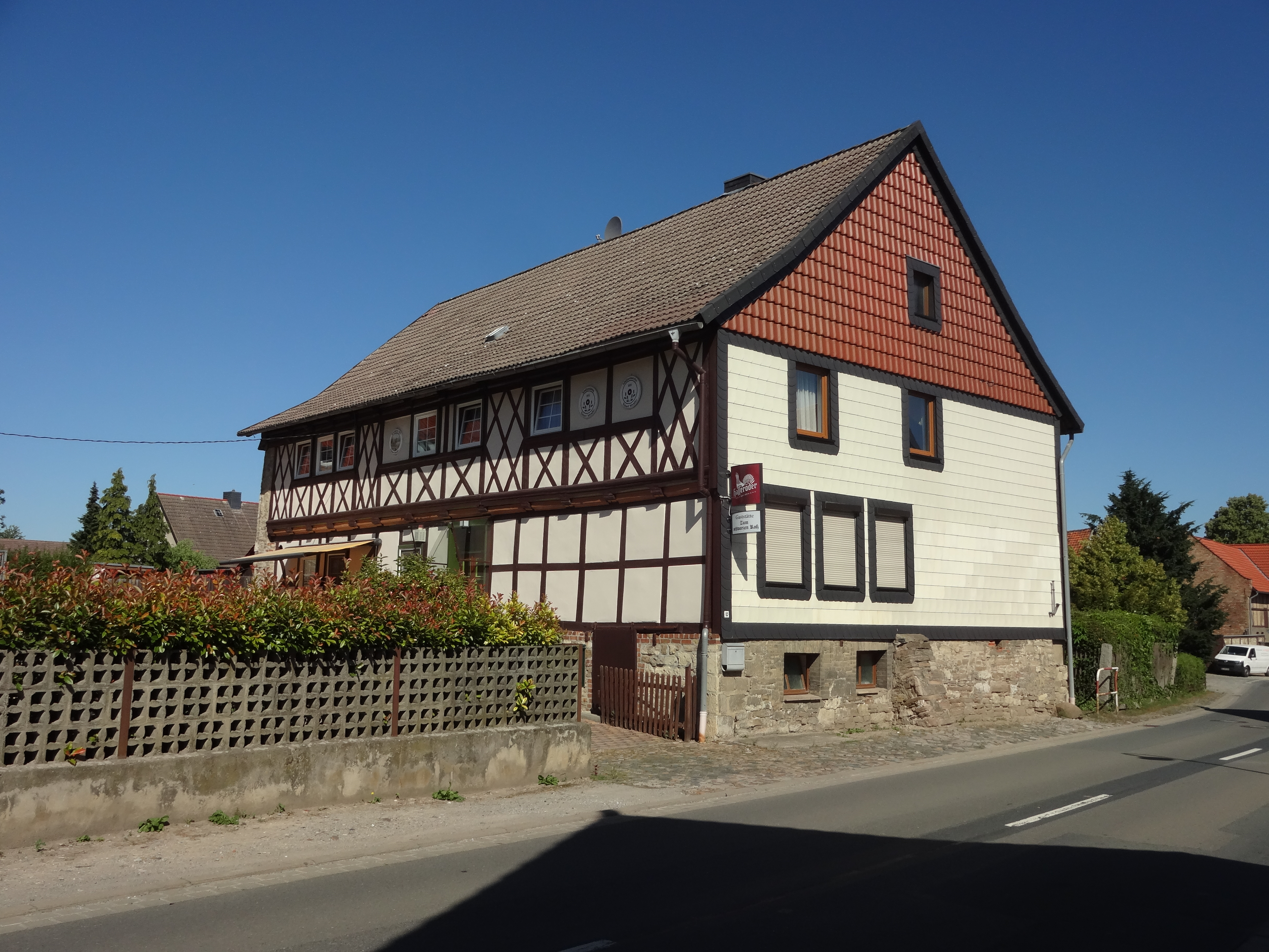 denkmalgeschützter Gasthof in der Hauptstraße 17 in Langeln, Gemeinde Nordharz